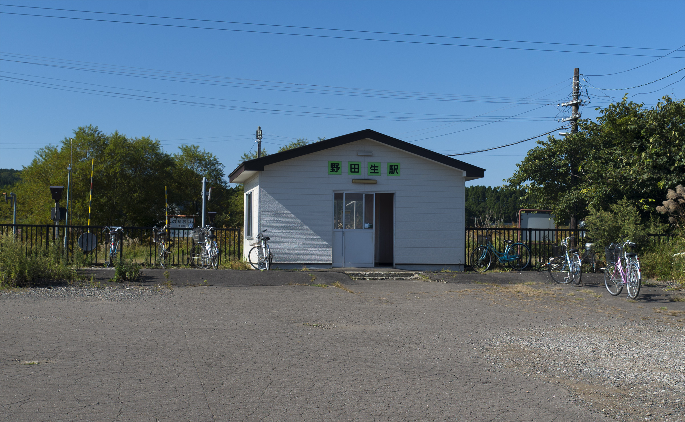 北海道旅客鉄道株式会社函館本線野田生駅駅舎